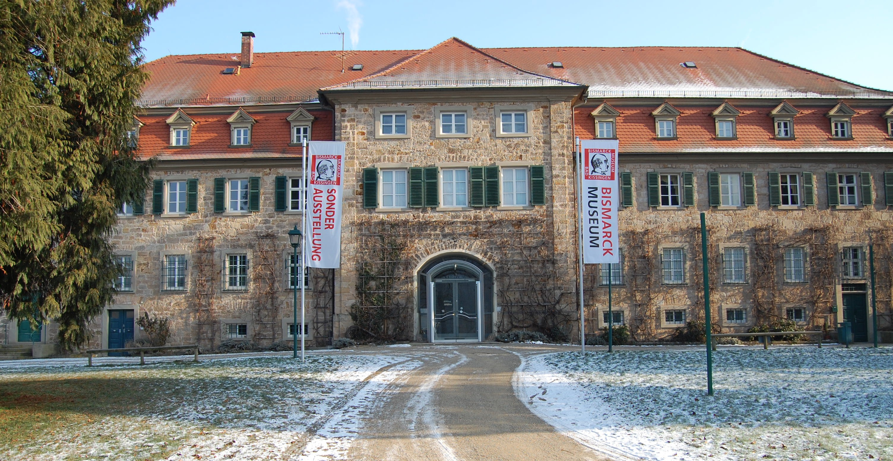 Bismarck-Museum (Obere Saline) in Bad Kissingen